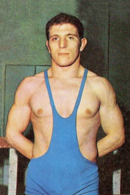 CAMPIONI dello SPORT 1970/71-n.47- RANZI - LOTTA